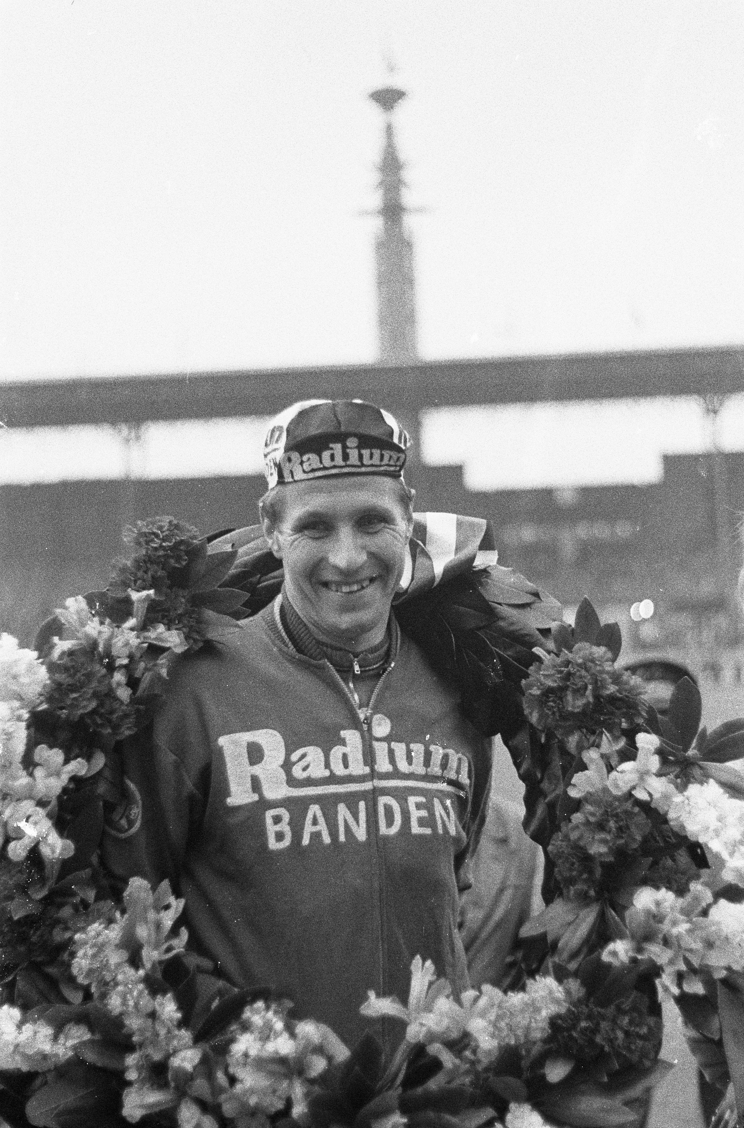 Collectie / Archief : Fotocollectie Anefo Reportage / Serie : [ onbekend ] Beschrijving : Einde Ronde van Nederland in het Olympisch Stadion te Amsterdam Datum : 17 mei 1960 Locatie : Amsterdam, Noord-Holland Trefwoorden : kransen, wielrenners Instellingsnaam : Olympisch Stadion Fotograaf : Pot, Harry / Anefo Auteursrechthebbende : Nationaal Archief Materiaalsoort : Negatief (zwart/wit) Nummer archiefinventaris : bekijk toegang 2.24.01.05 Bestanddeelnummer : 911-2627